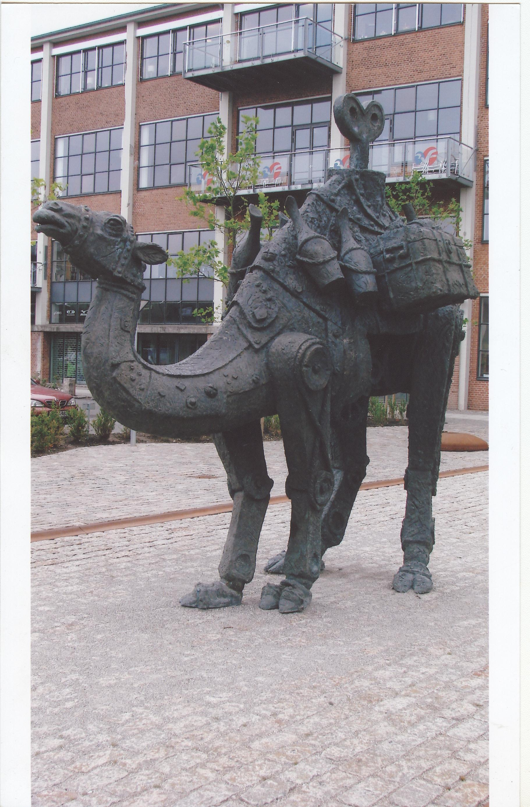 Скульптура Петра Рейхета в г. Оденсе, Дания, 2001